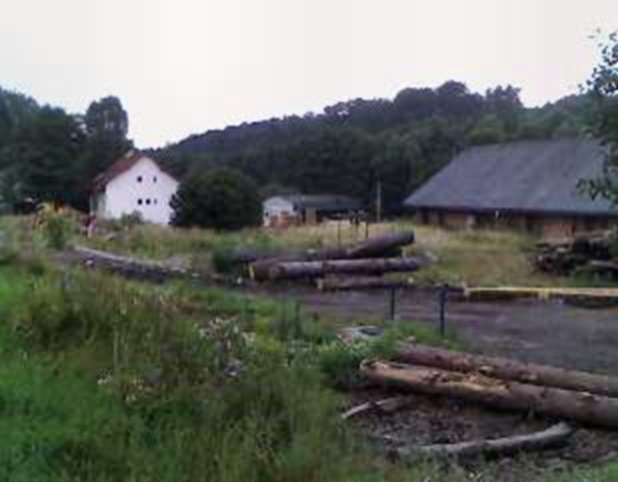 Sägerei Rečkov